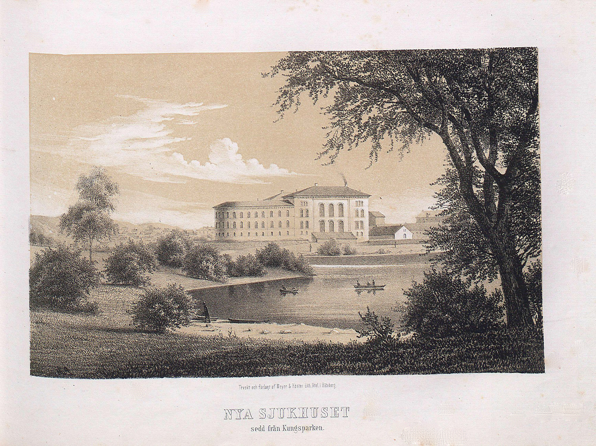 Litografi av Sahlgrenska sjukhuset (idag Sociala Huset) från 1855.